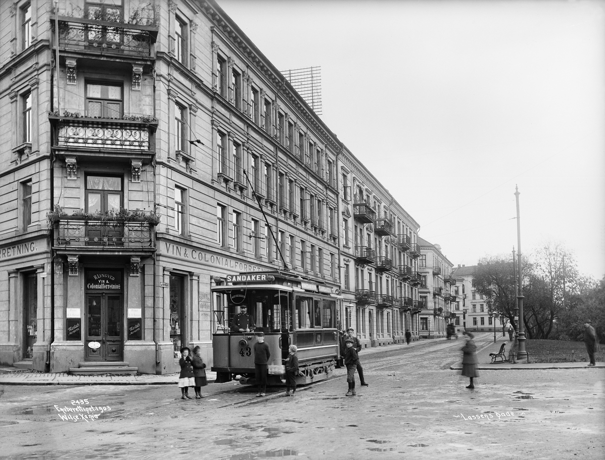 Lassons gate fotografert i 1903, med Parkveien 80 nærmest. Gården ble ødelagt i Filipstadeksplosjonen i 1943. Foto: Anders Beer Wilse, fra Byhistorisk samling hos Oslo Museum.